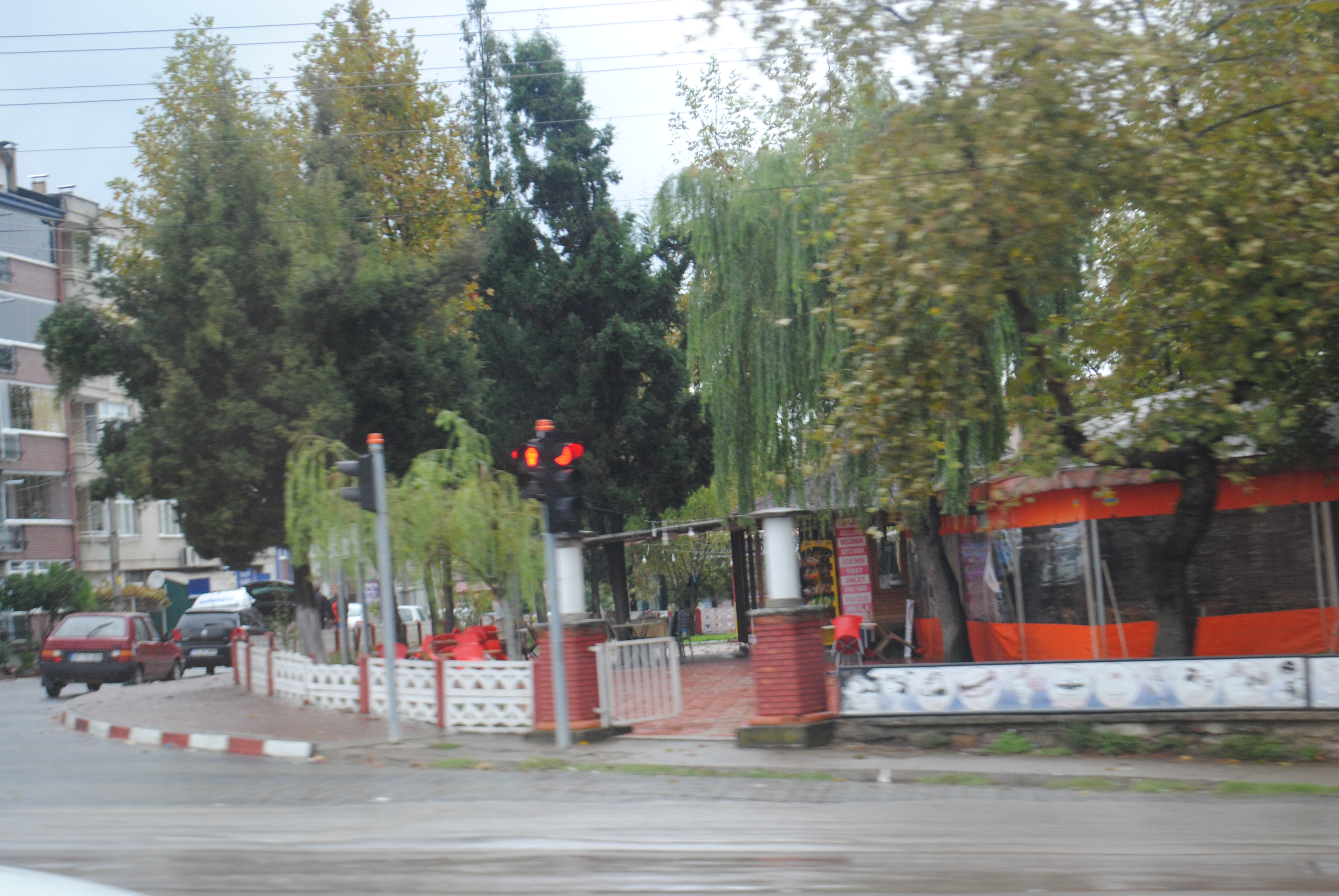 Bartın'dan çeşitli görüntüler